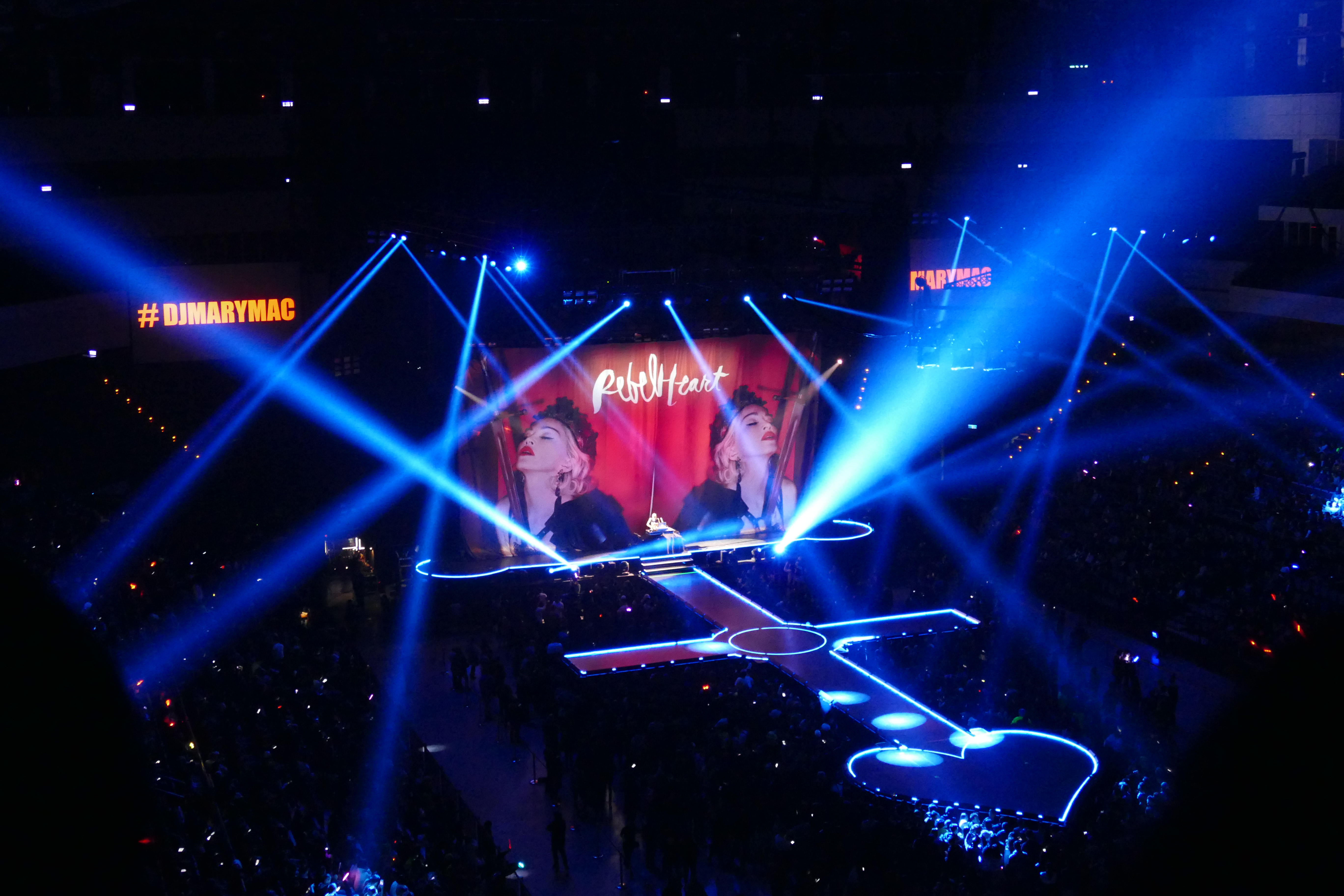 taipei_madonna_concert-4